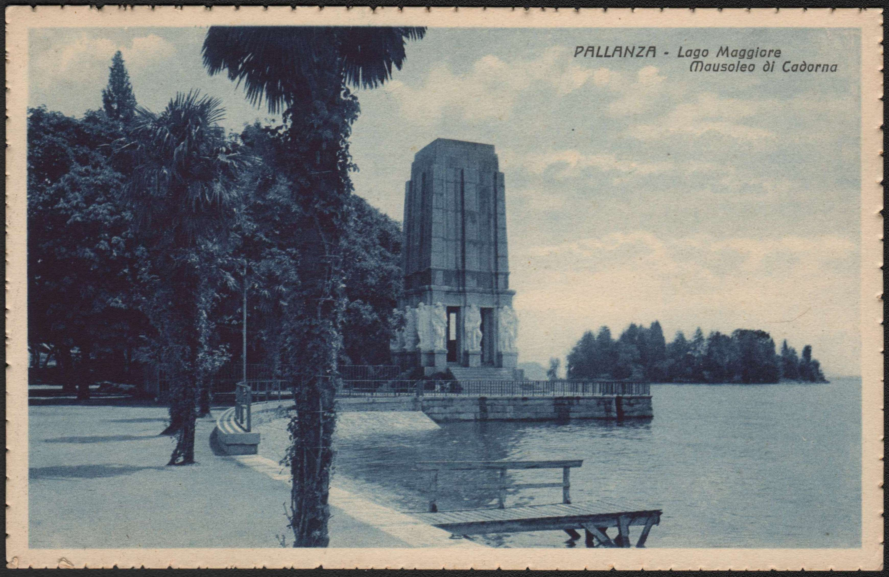 Pallanze - Lago Maggiore Mausoleo di Cadorna.